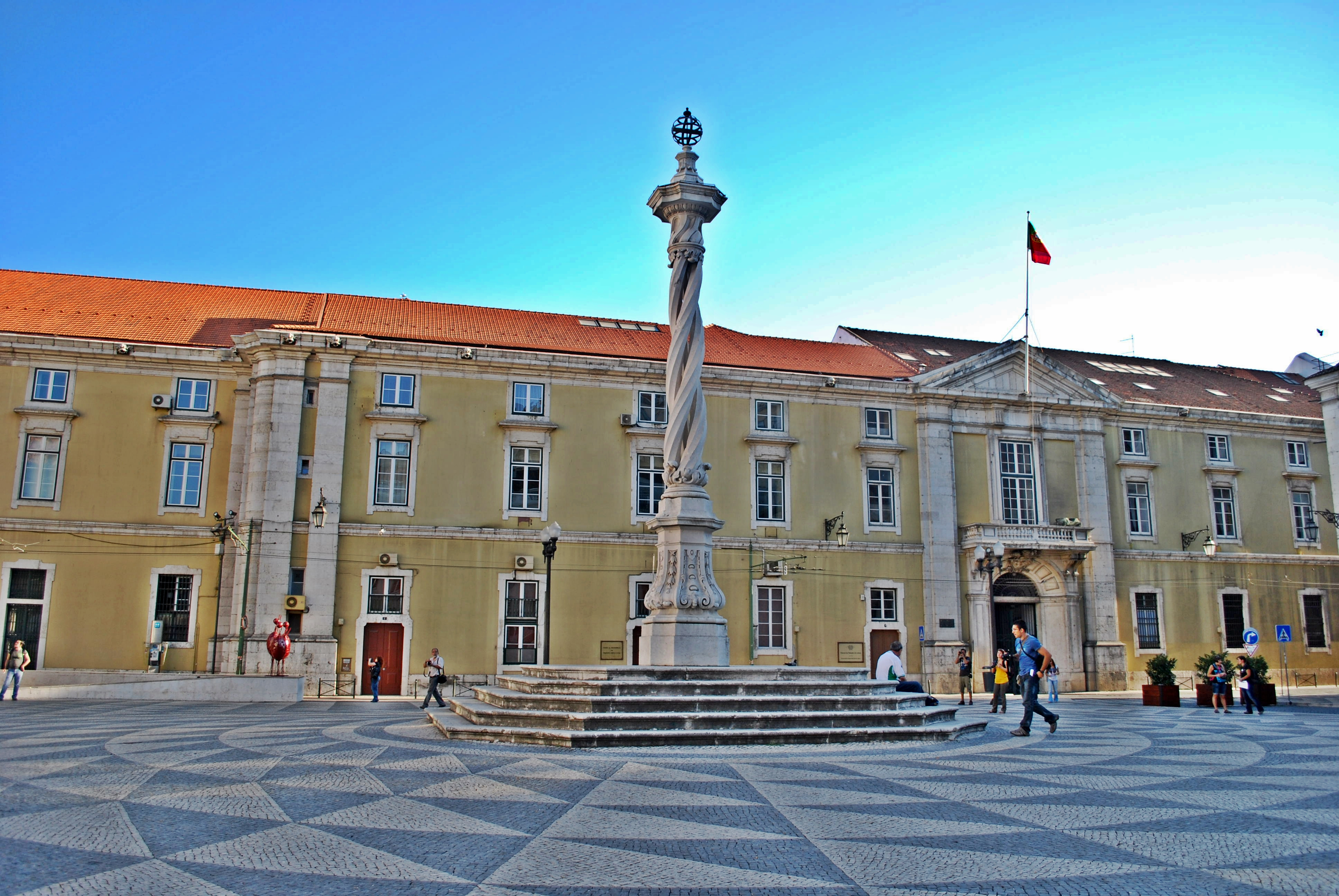 Pelourinho de Lisboa This file was uploaded for Wiki Loves Monuments in Portugal with the unique identifier 70709.